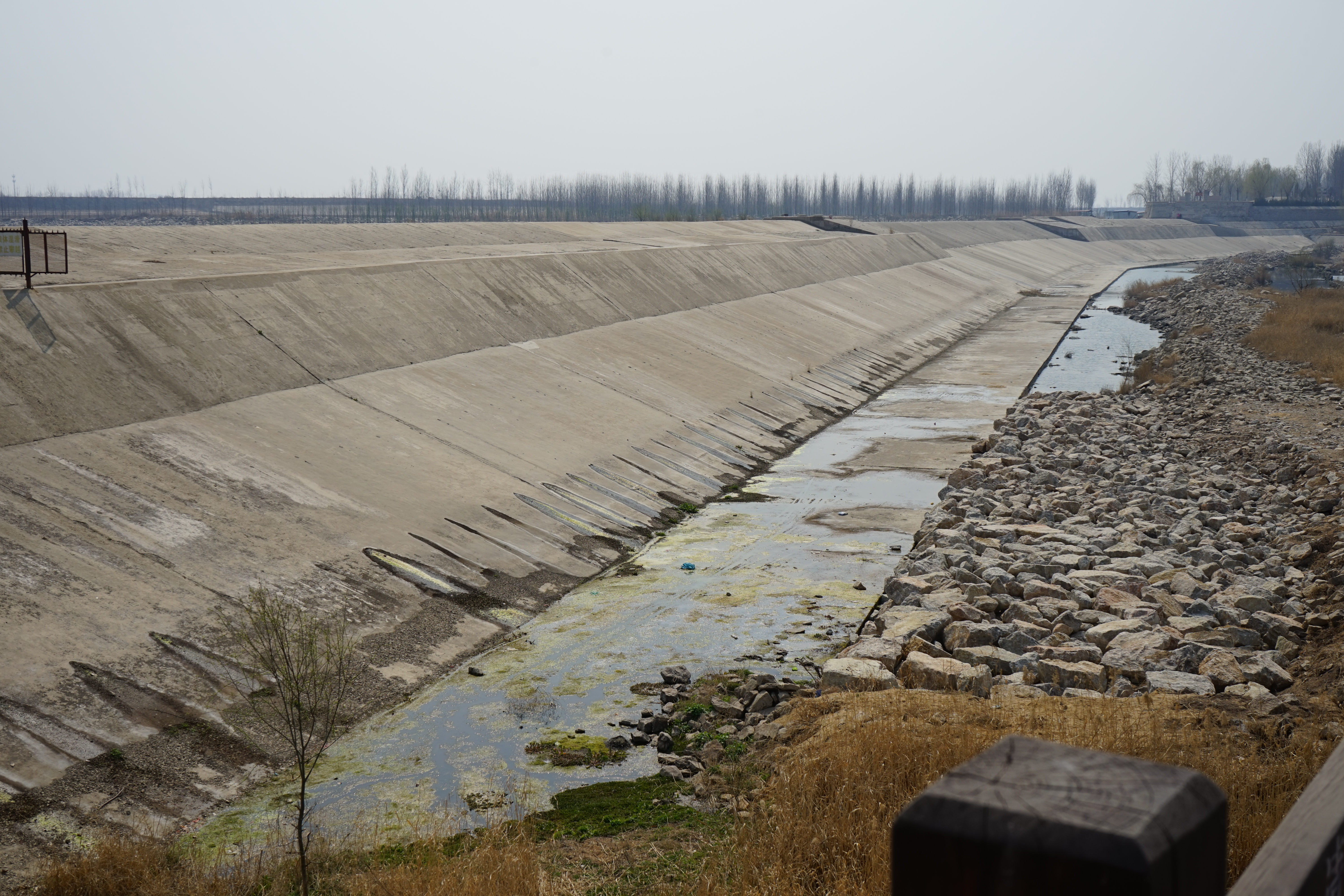 中文（中国大陆）: Daicun Dam